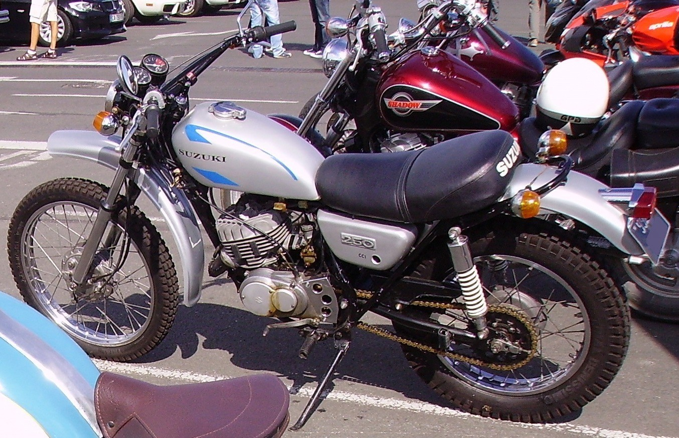 Suzuki TS250.